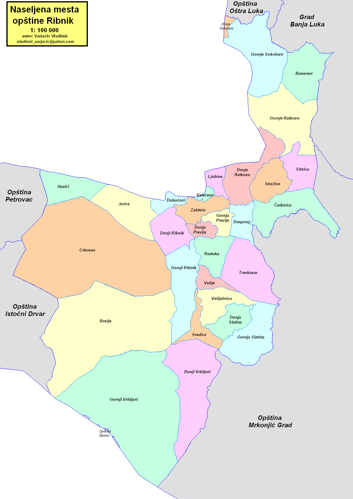 Opština Ribnik